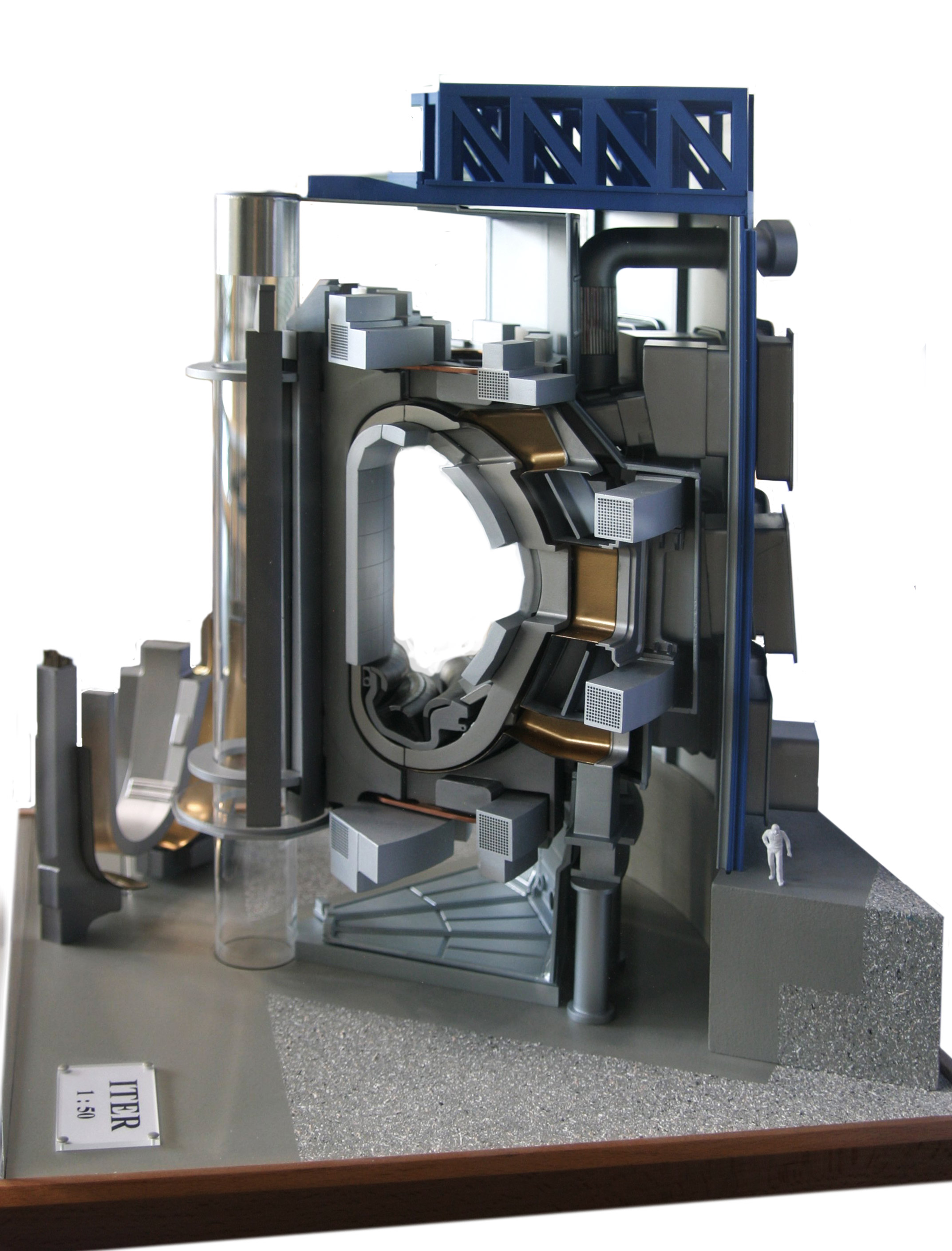 Cett image n'est qu'un essai qui risque de disparaitre. Ne pas utiliser dans un article. This picture is only a trial wich I could erase. Do not use in an article. Image de / Picture of: ITER Editée par / Edited by: KentZilla 11:41, 27 July 2006 (UTC) Image originale / Original picture : Image:ITER-img 0237.jpg Même licence / Same licence